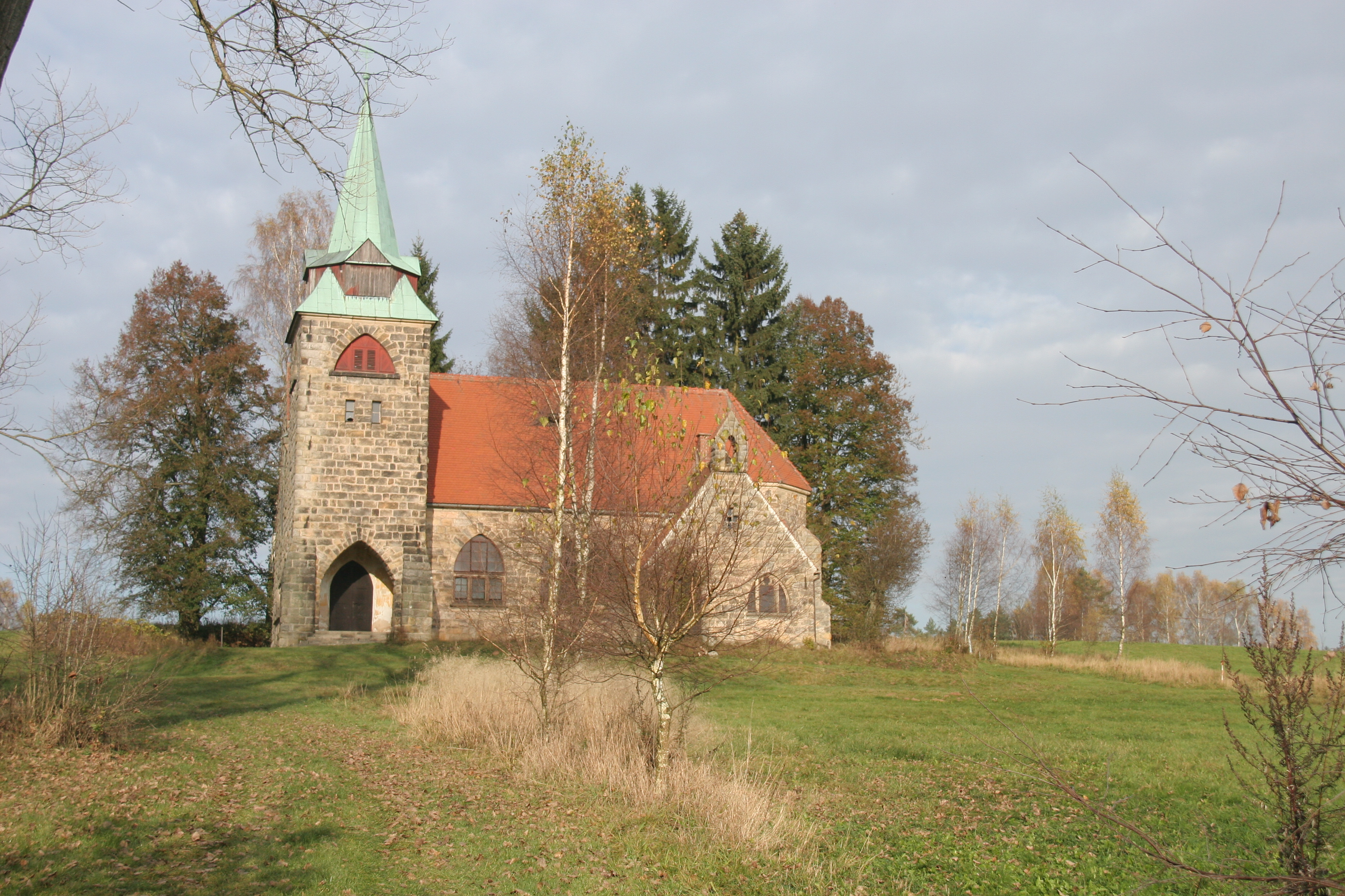 Borovnička kostel